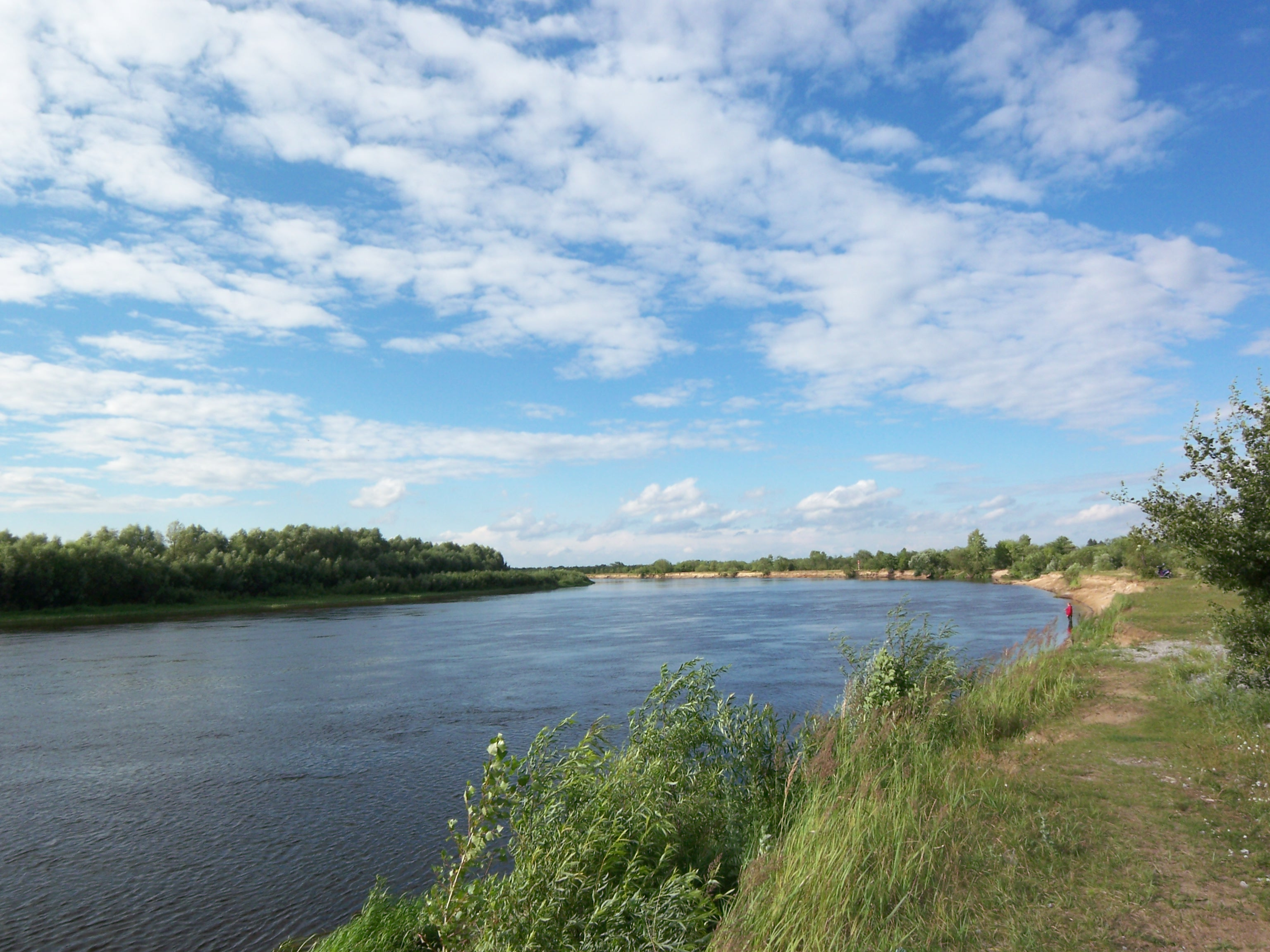 Berezina River